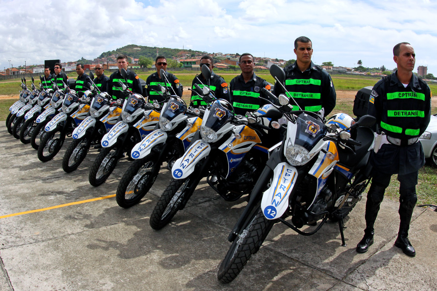 Governo de Sergipe entrega avião, motos e ônibus a SSP Foto: Marco Vieira/ASN